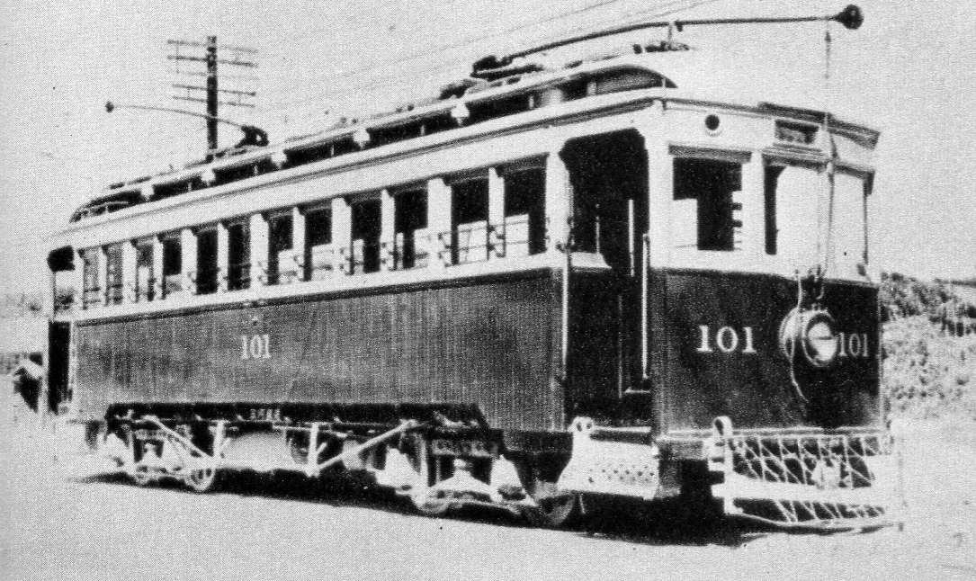 三河鉄道100形（元・岡崎電気軌道）